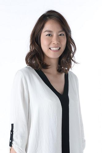 中川聴乃（フリー）